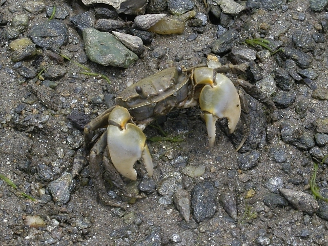 Helice tridens (アシハラガニ), Kohnoura, Nagasaki(長崎市神浦)